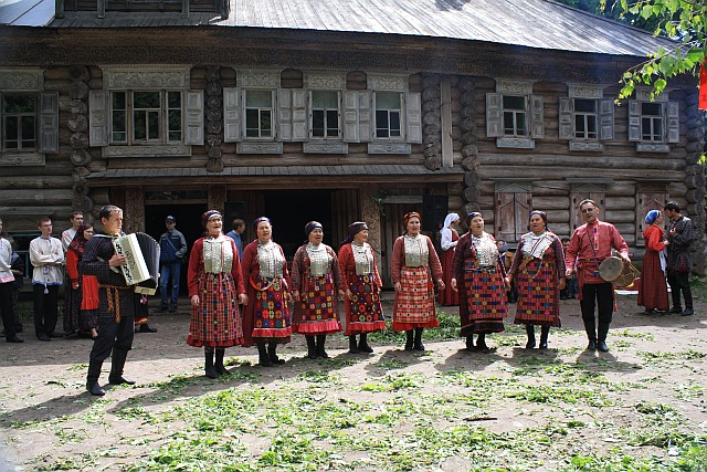 Марджан Гуръёз на Троице